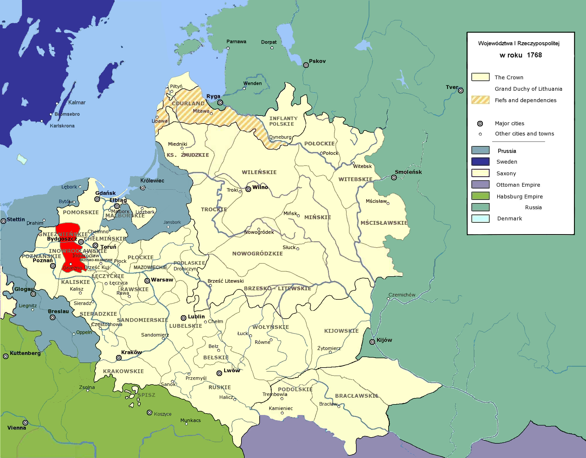 Rzeczpospolita Obojga Narodów w 1768 r.; województwo gnieźnieńskie Polish-Lithuanian Commonwealth in 1768; Gniezno Voivodeship